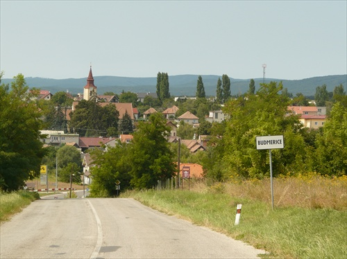 panorama budmeric